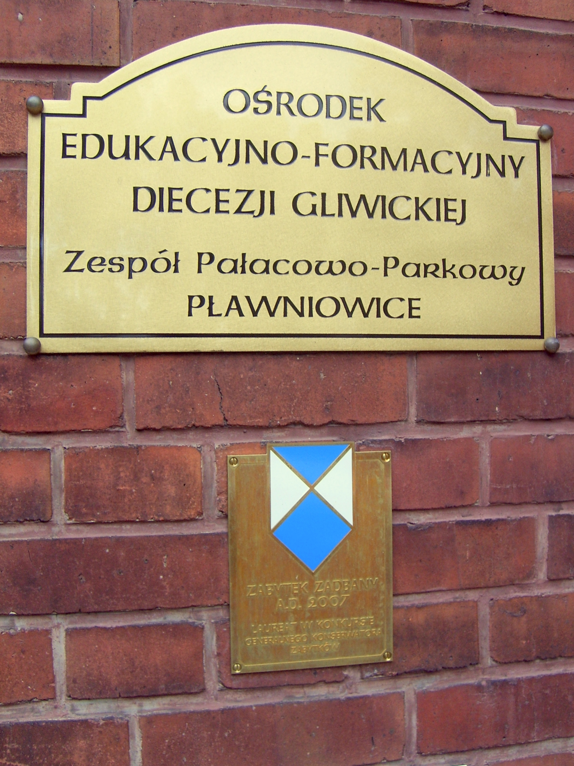 Zespół pałacowo-parkowy w Pławniowicach - tabliczka informująca o przyznanej nagrodzie w konkursie "Zabytek Zadbany". Zdjęcie wykonała 5 sierpnia 2007 r. Ilona Miłkoś i udzieliła zgody na jego wykorzystanie.